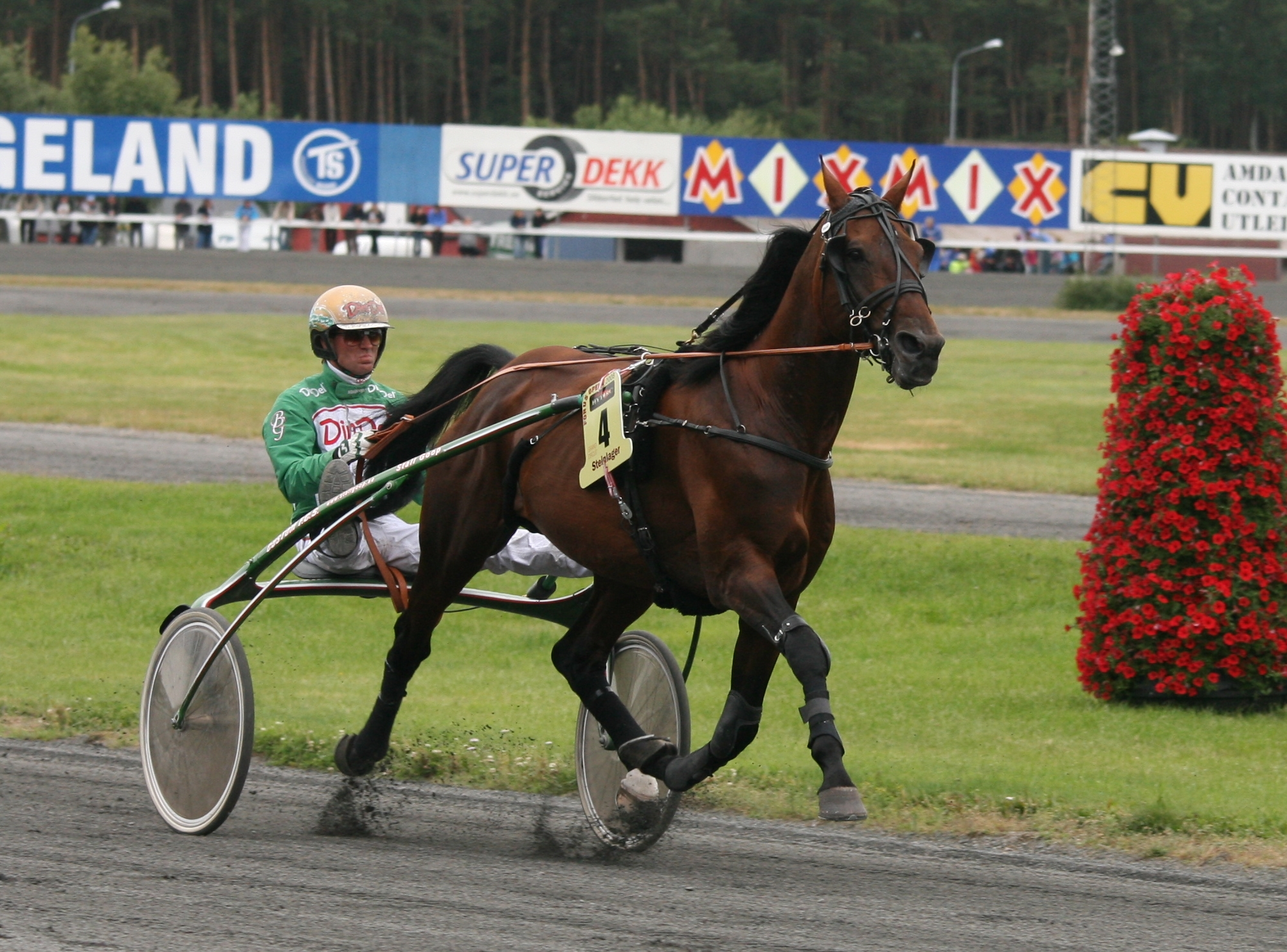 Steinlager under Forus Open 2008